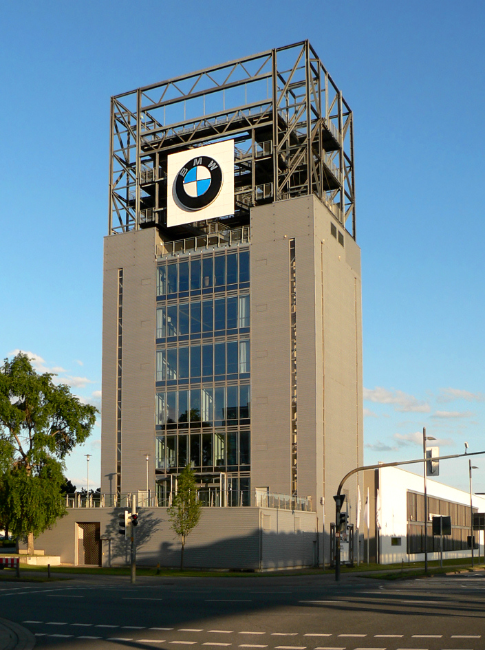 Postbox der Expo 2000, heute BMW